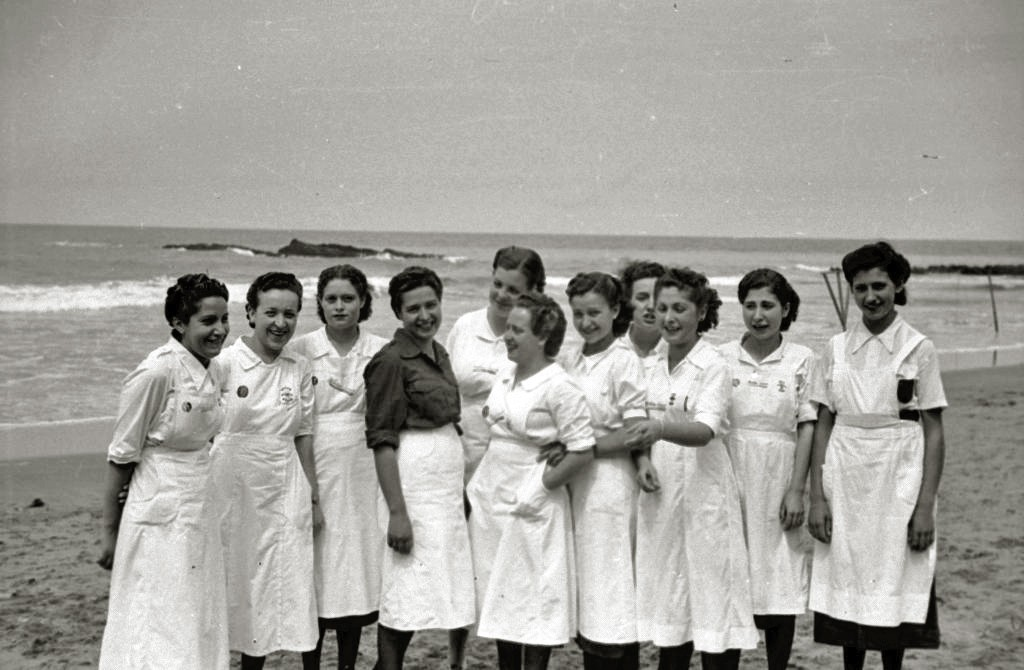 Título original: Grupo de niños y voluntarias de la Sección Femenina en la localidad de Zumaia (1/11) Localización: Zumaya (Guipúzcoa)